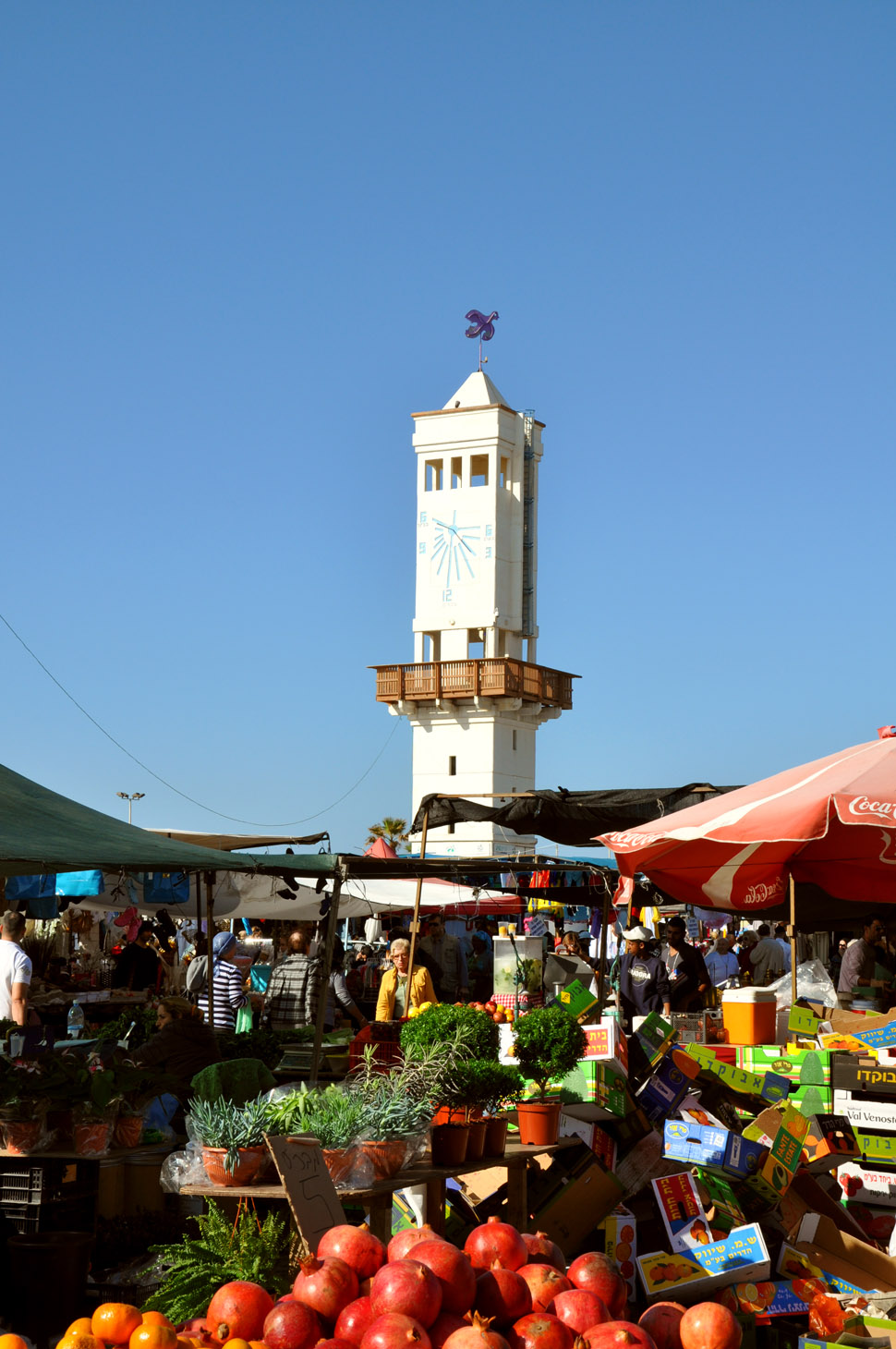 Market place HaTayelet